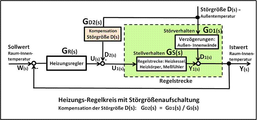 Blockschaltbild eines Regelkreises mit Störgrößenaufschaltung